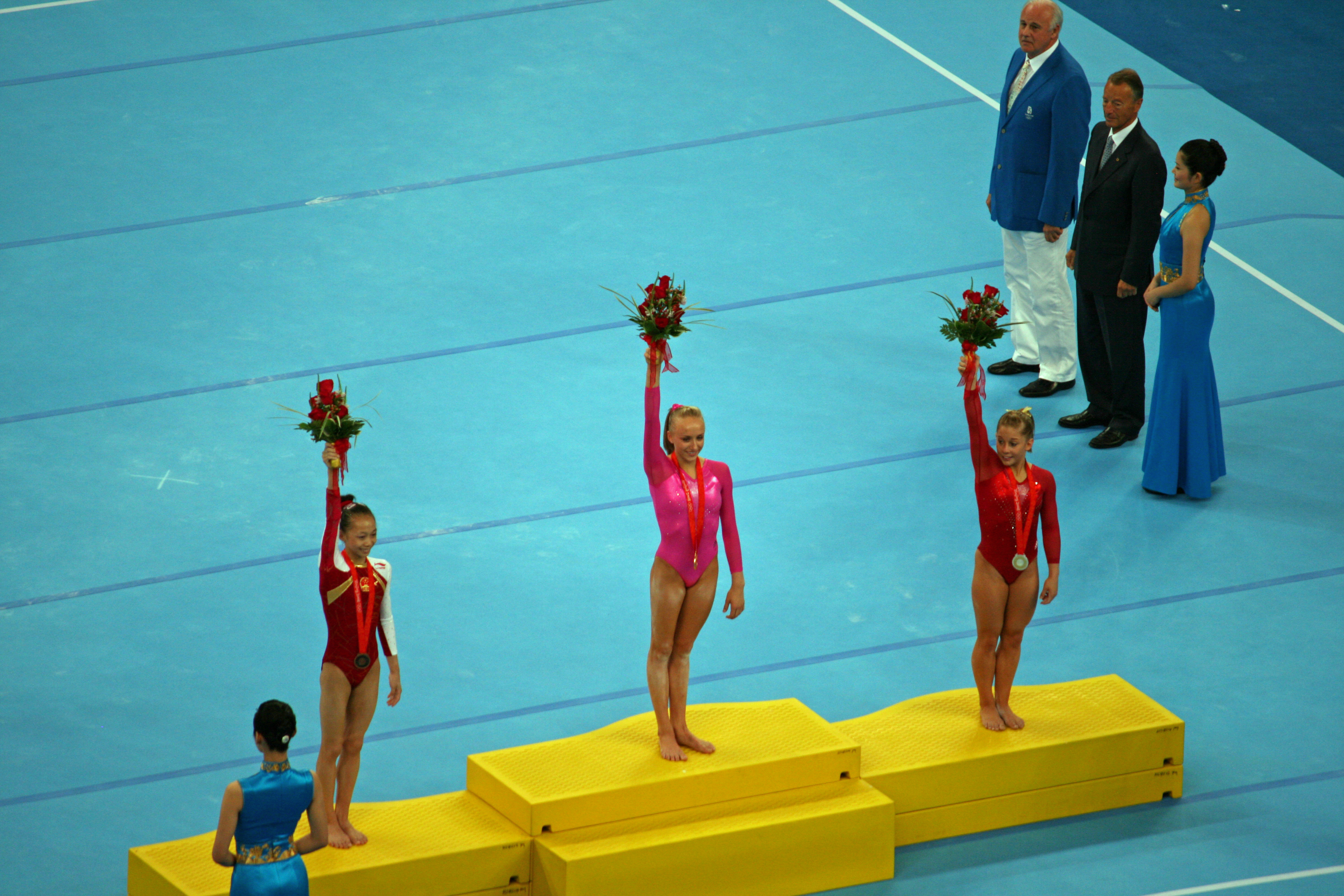 2008 OG - podium, Nastia Liukin and Shawn Johnson win the Women's Overall Gold and Silver medals respectively